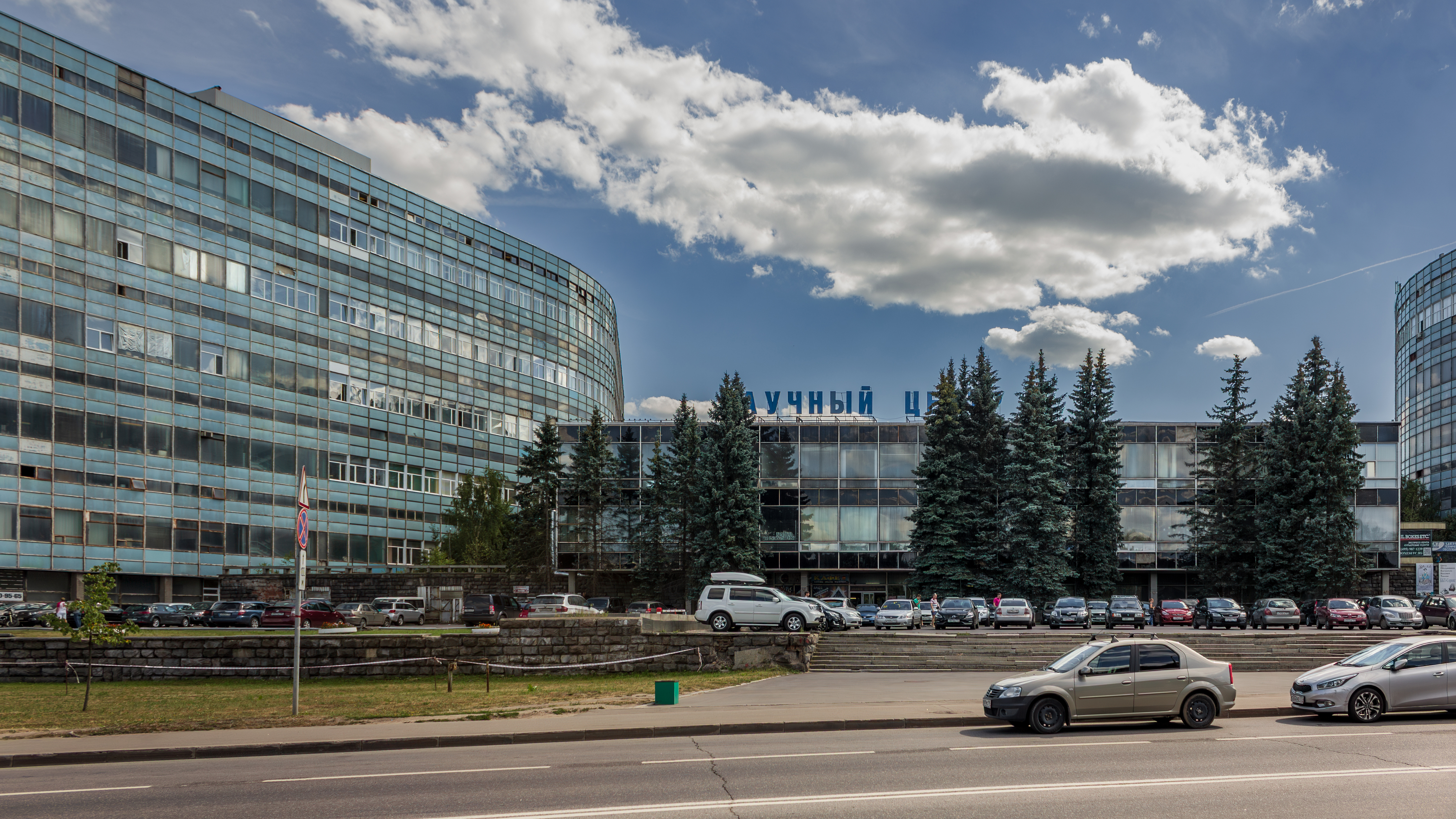 Здание НПО «Научный центр» (так называемая «Шайба») в г. Зеленограде